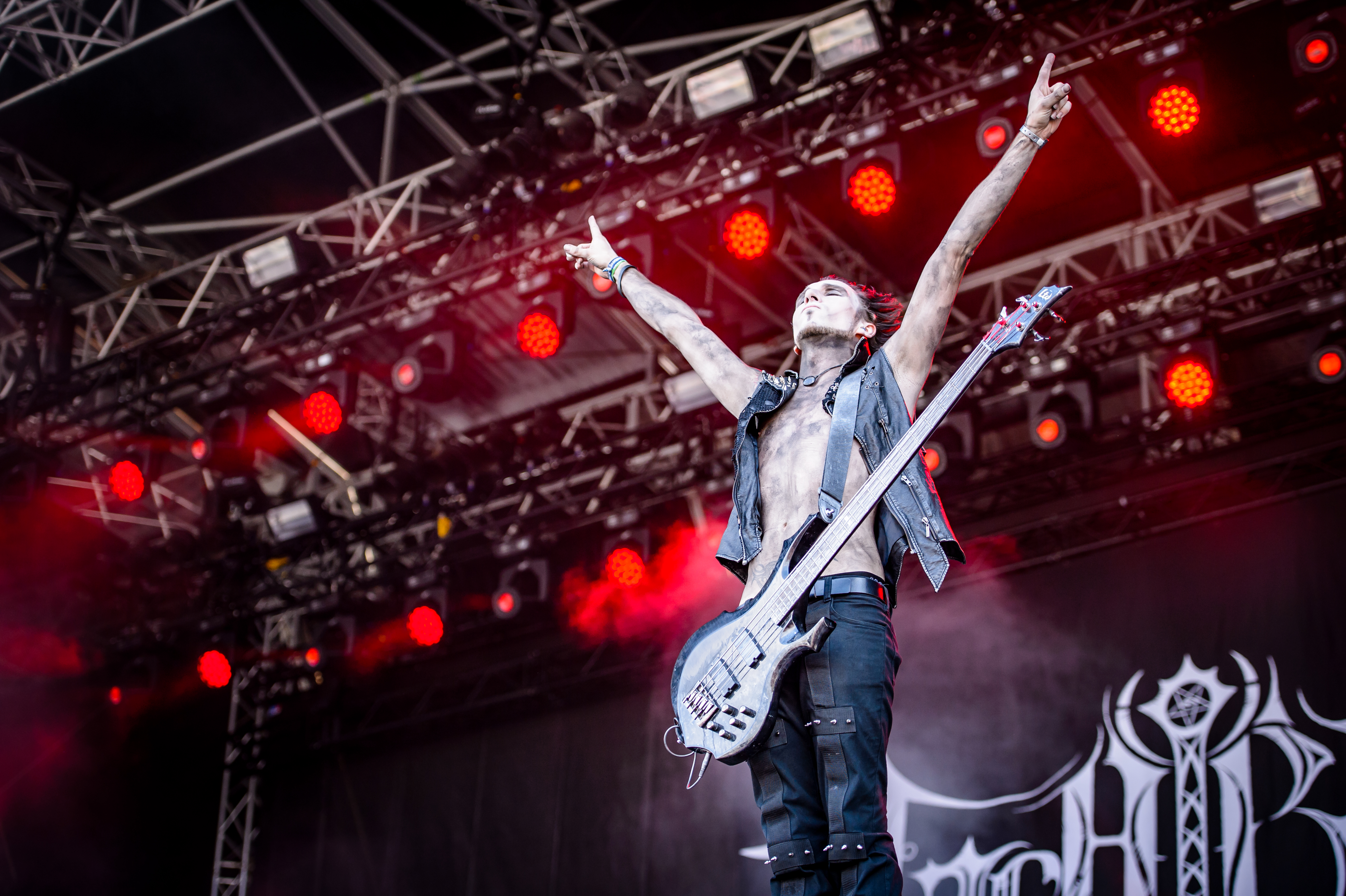 'RockHarz Open Air 2017; Ballenstedt': 'Nachtblut'